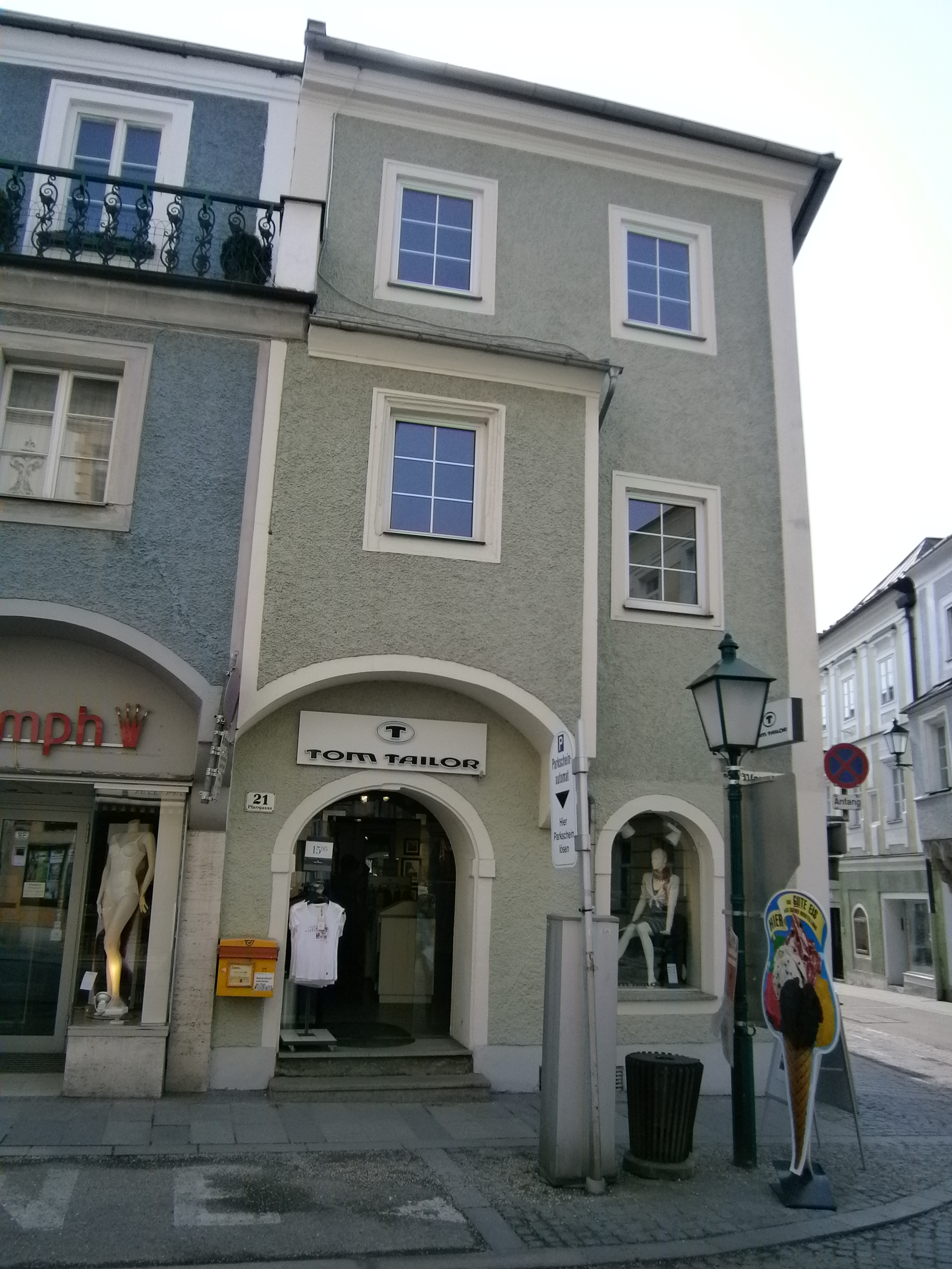 Object location48° 30′ 39.6″ N, 14° 30′ 11.11″ E